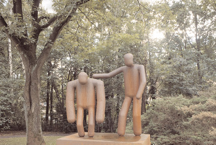 Kunstwerk te Apeldoorn